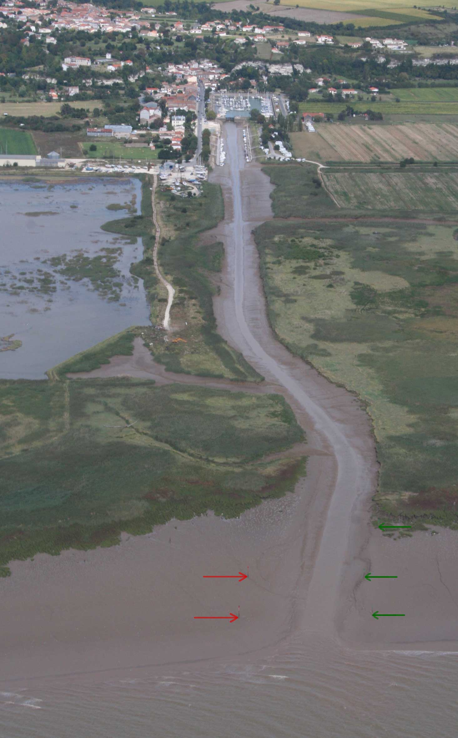 Photo aérienne du chenal de Mortagne sur Gironde vu depuis l'Estuaire